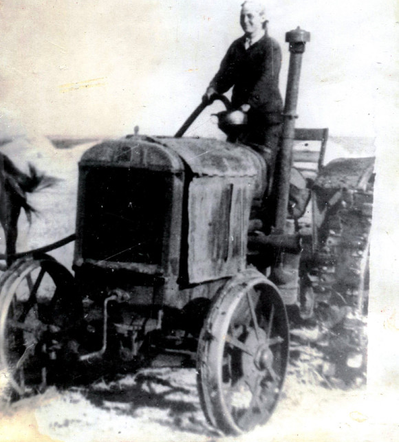 В Мельгунах создавались женские тракторные бригады